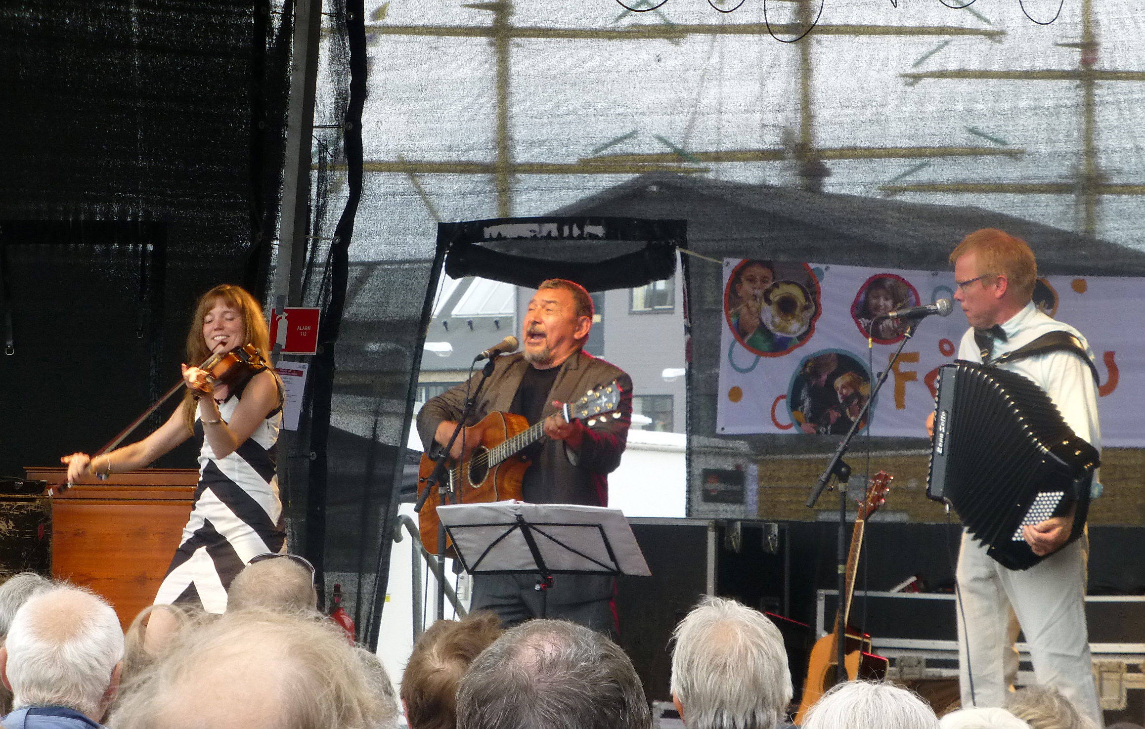 Rasmus Lyberth with group at Tall Ships' Races in Aarhus 5. july 2013